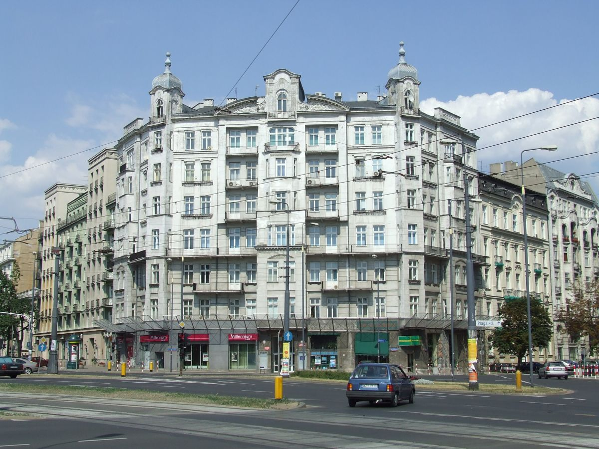 Plac Unii Lubelskiej, Warszawa, Poland